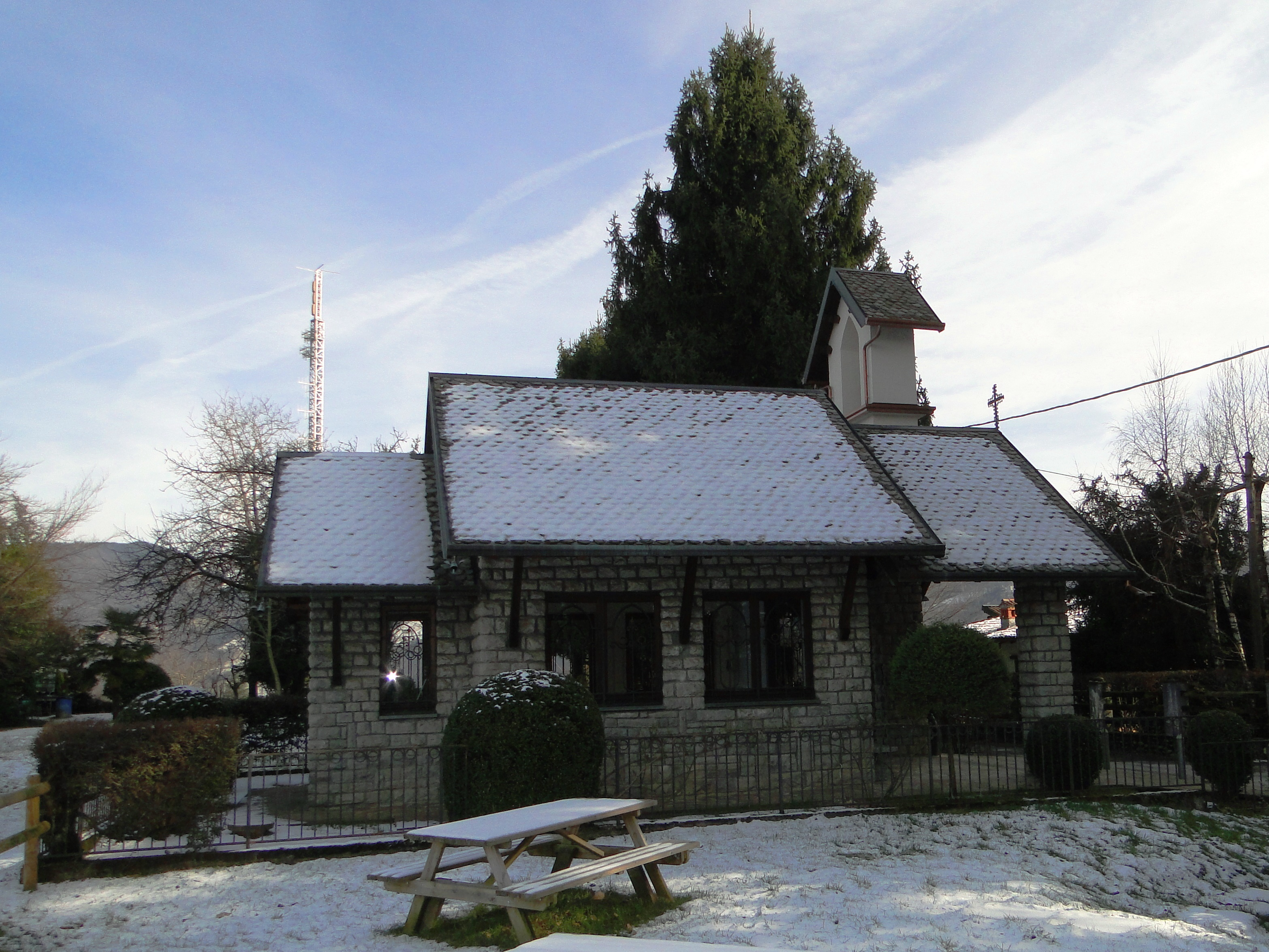 Chiesetta degli alpini, monte Beio. Leffe (BG). Italy